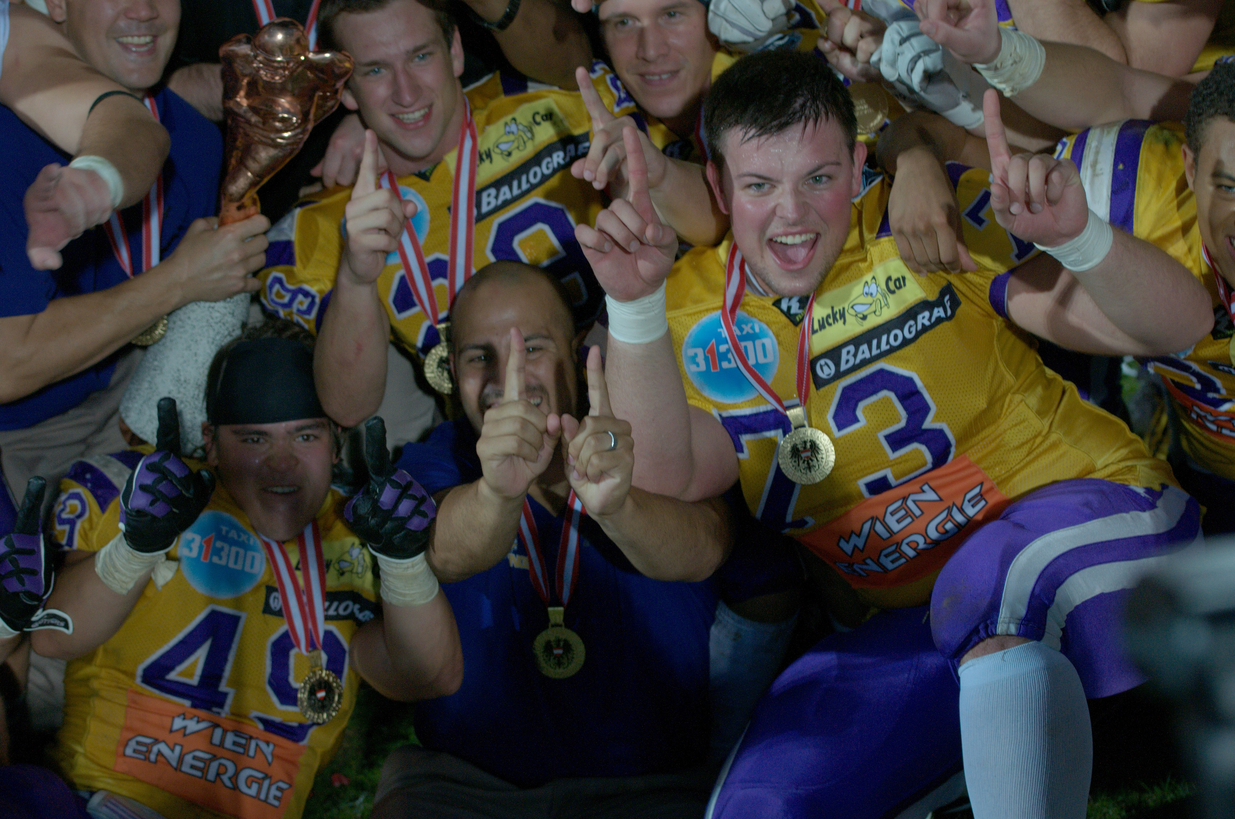 Die Spieler der Vienna Vikings feiern ihren Sieg bei der Austrian Bowl XXVIII